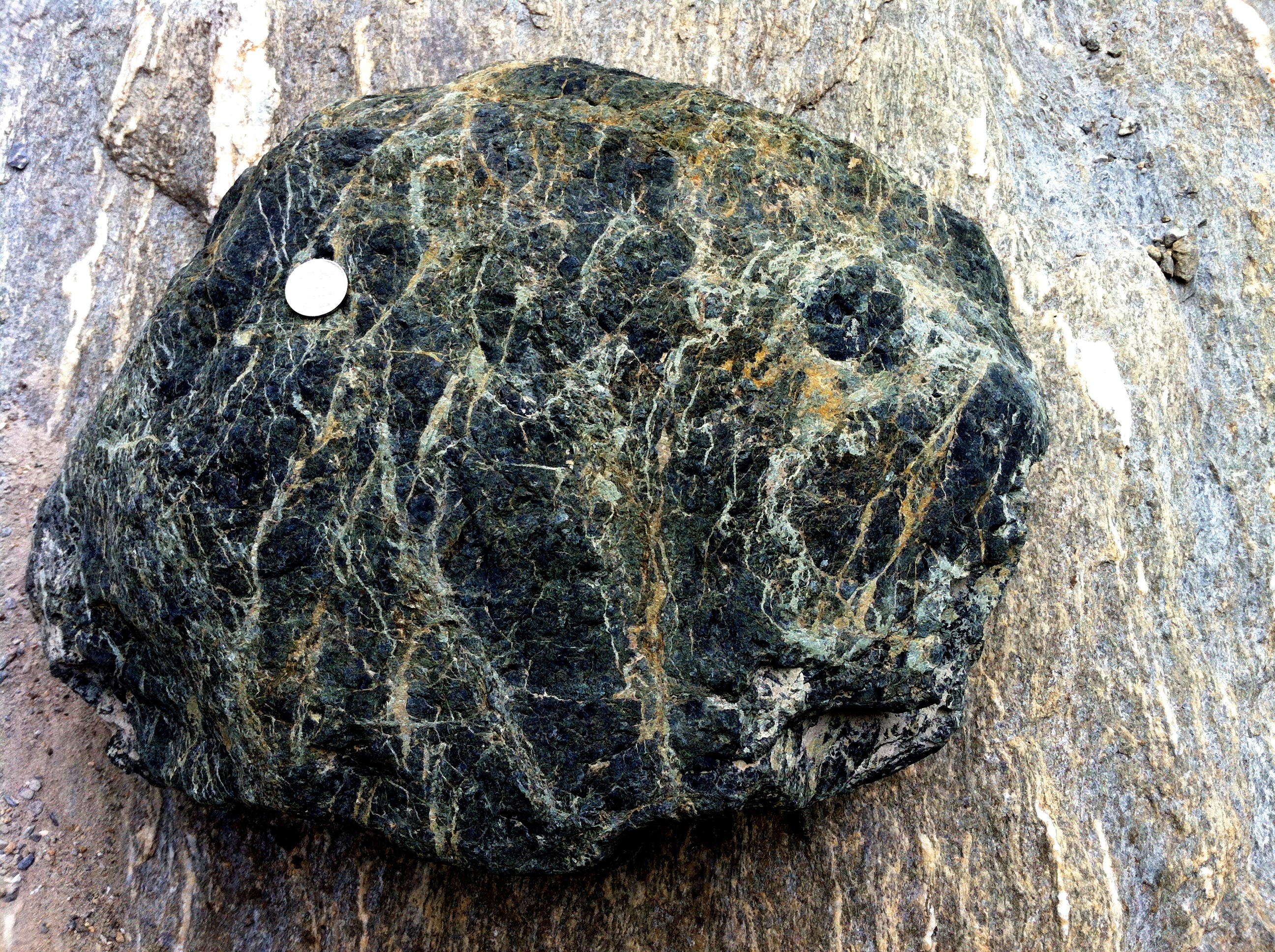 Bloc de Serpentinite (Savoie)